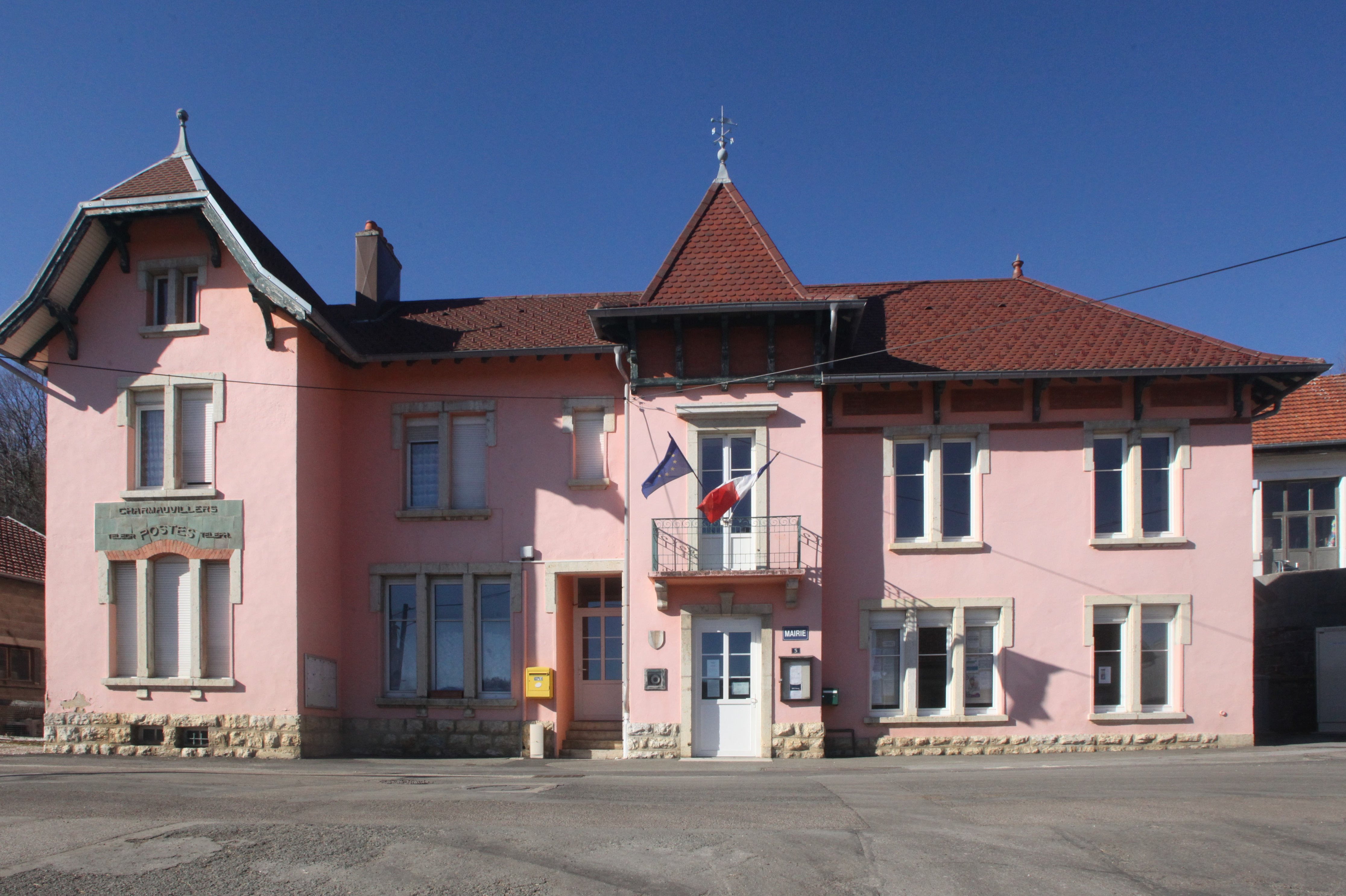 Mairie de Charmauvillers.